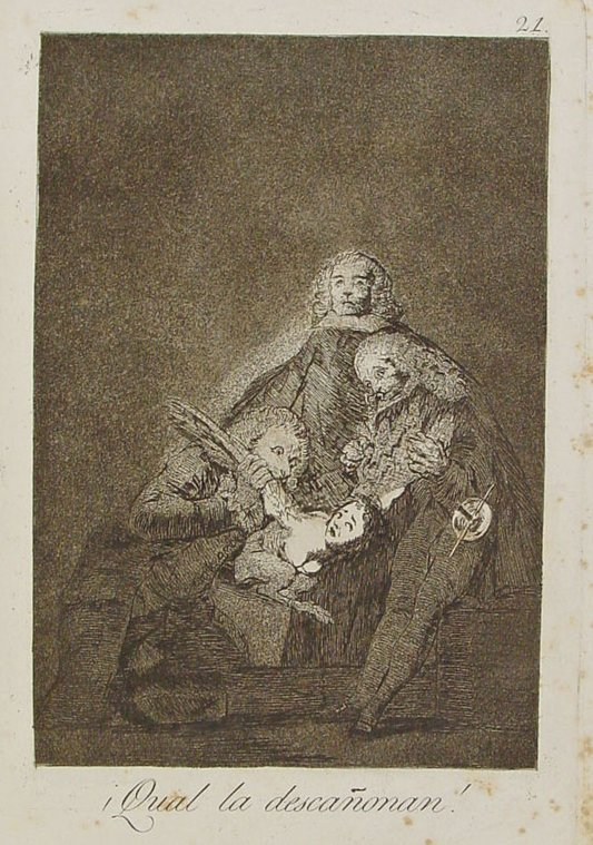 Capricho nº 21: ¡Cual la descañonan! de Goya, serie Los Caprichos